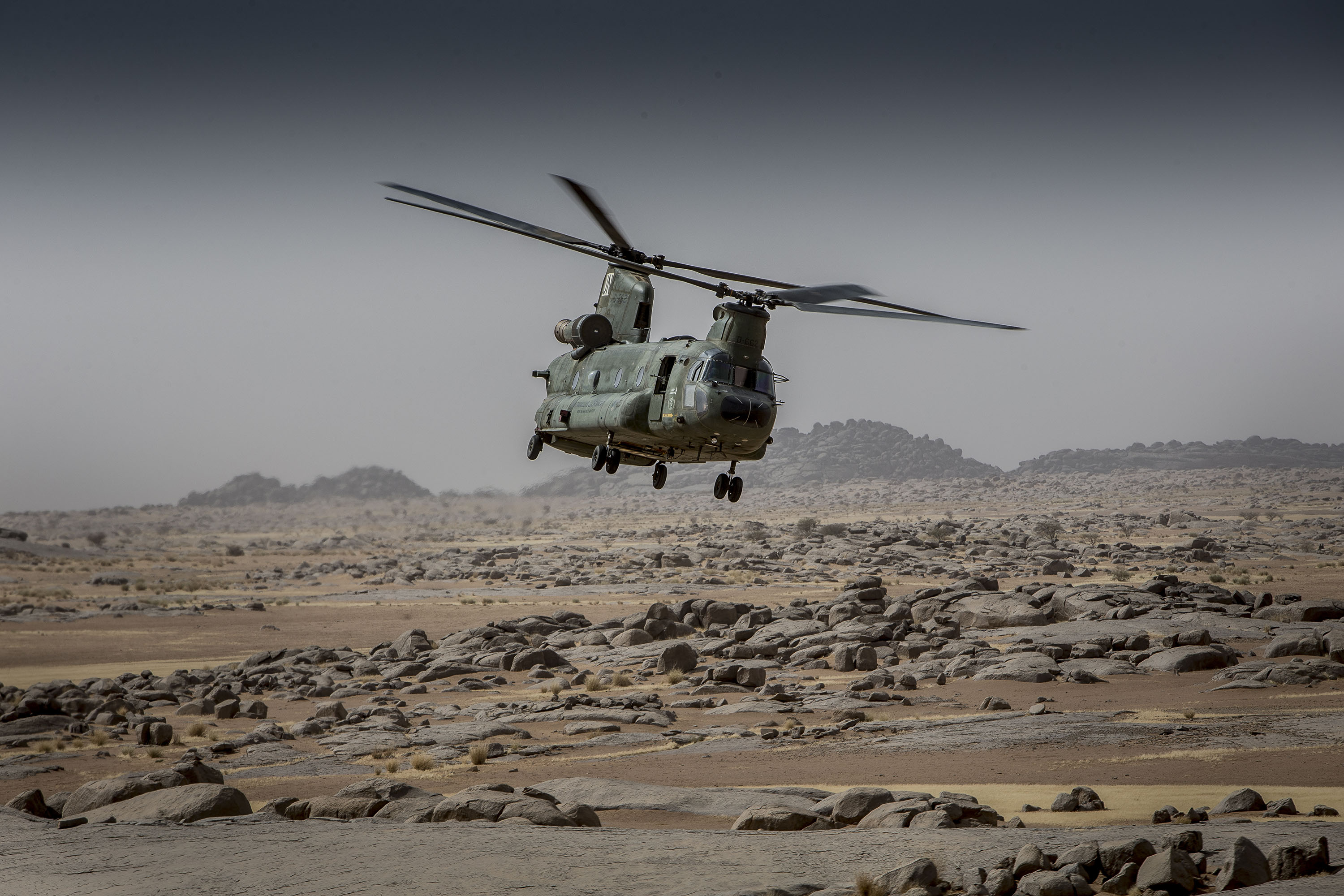 Een Nederlandse Chinook-transporthelikopter heeft in Mali 4 Tsjadische militairen naar een hospitaal gebracht. Ze raakten gewond nadat ze op een mijn reden. Daarbij kwam ook 1 Tsjadische collega om het leven. Een overzicht van Defensieoperaties in de week van 1 tot 8 augustus. Een Chinook-transporthelikopter in Mali (december 2015).